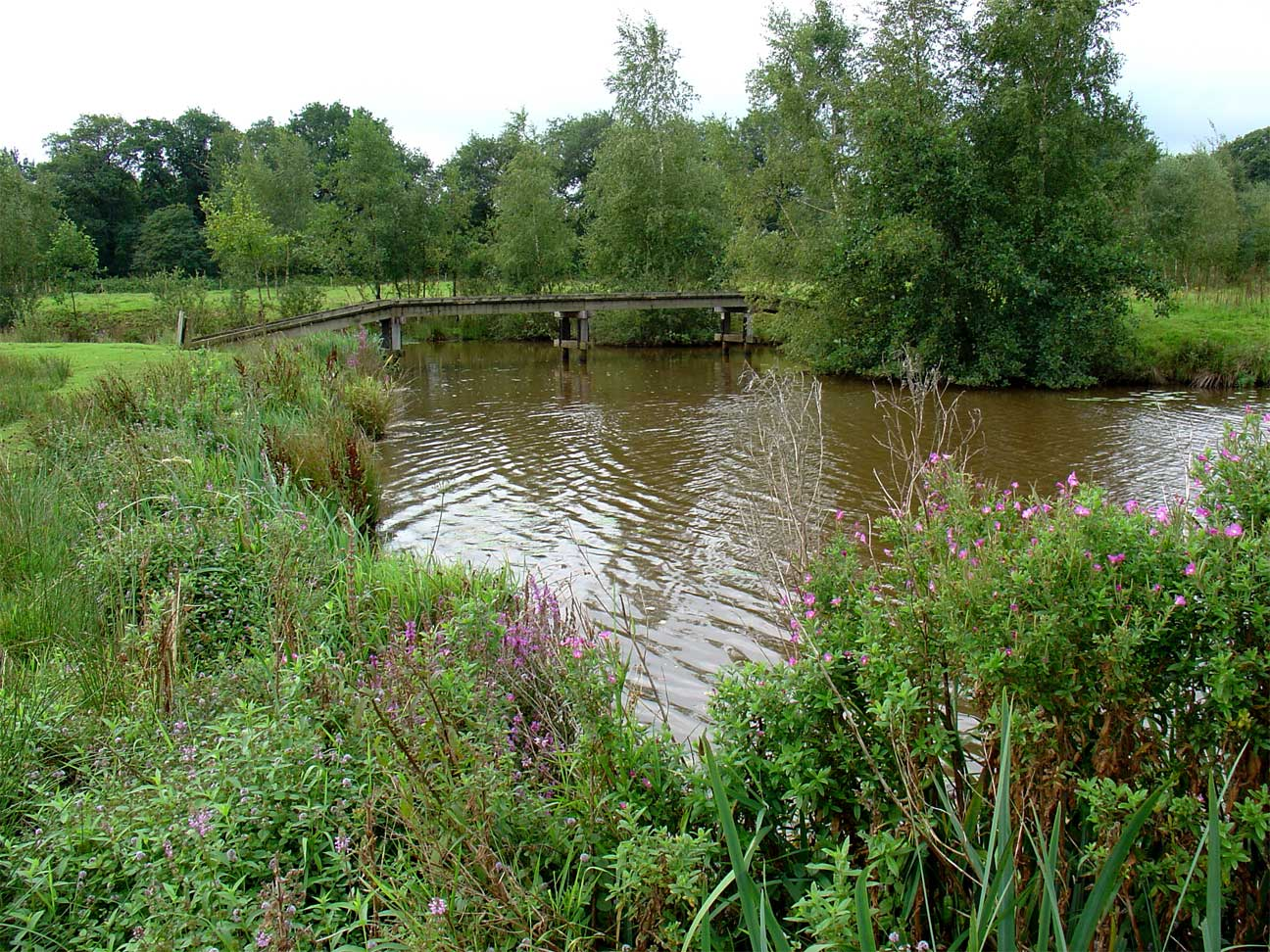 Ruiten Aa nabij Weende